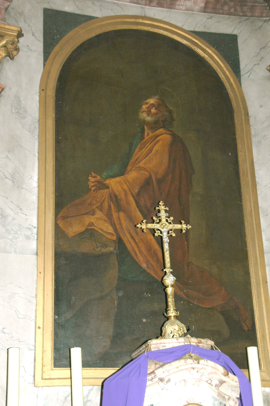 Peinture de François Devosge